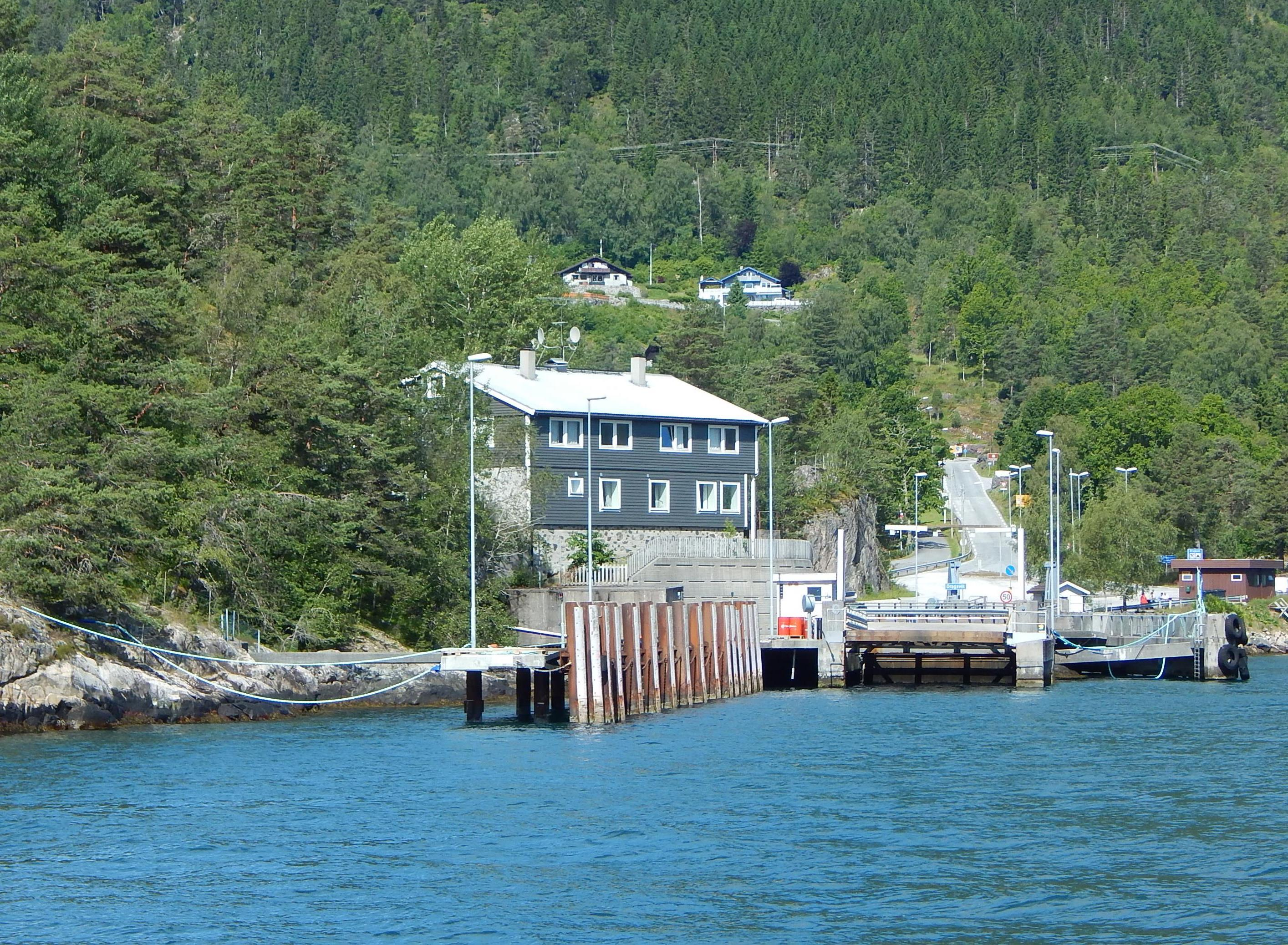 Dragsvik fergekai